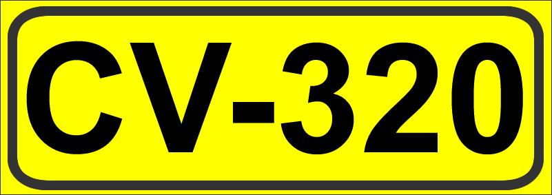 Inidcador de la Carretera de la Comunidad Valenciana CV-320